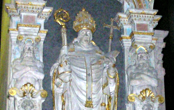 Grabdenkmal des Mainzer Erzbischofs Sebastian von Heusenstamm im St. Martinsdom in Mainz